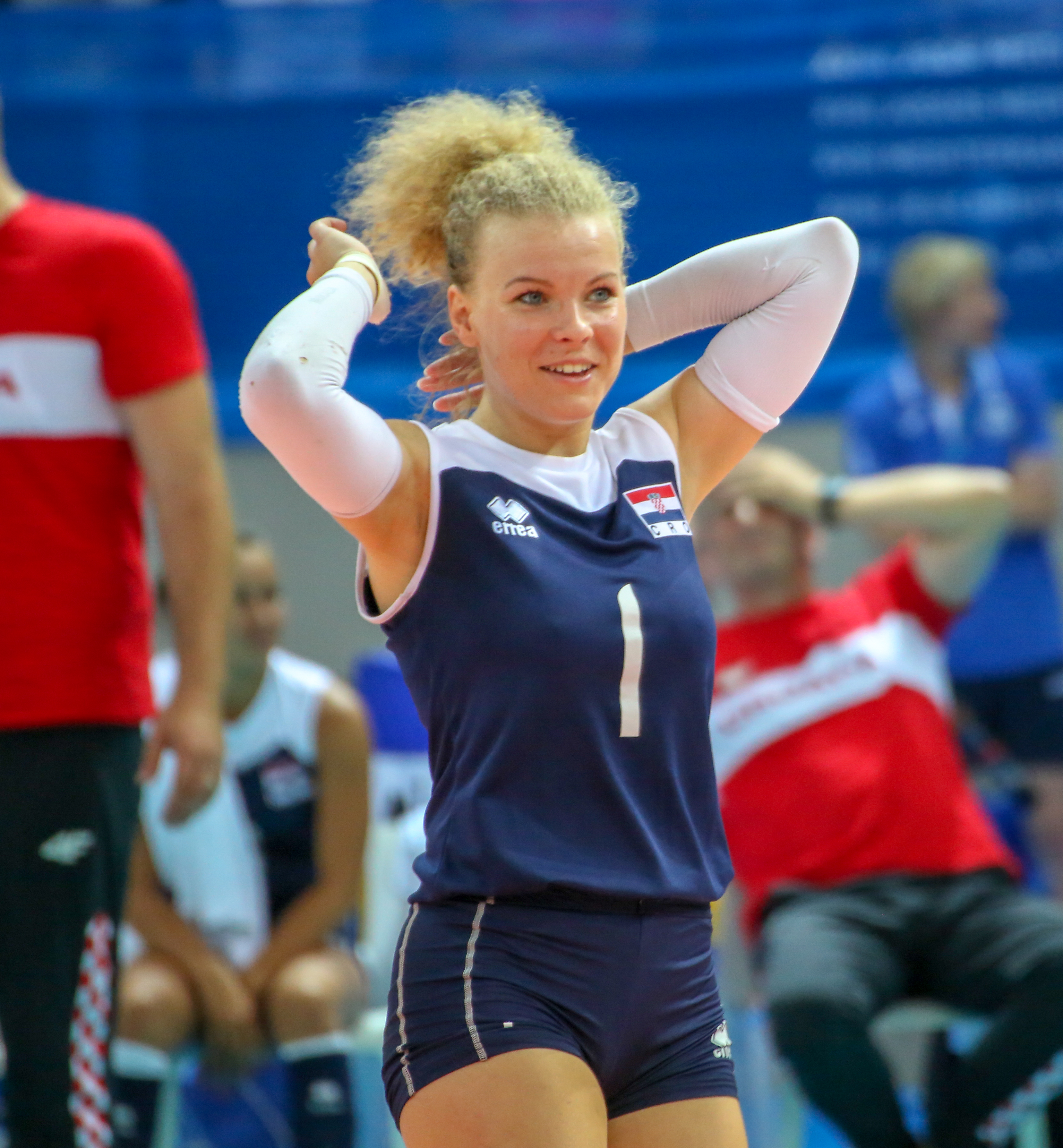 Rene Sain - Final de los Juegos del Mediterráneo 2018